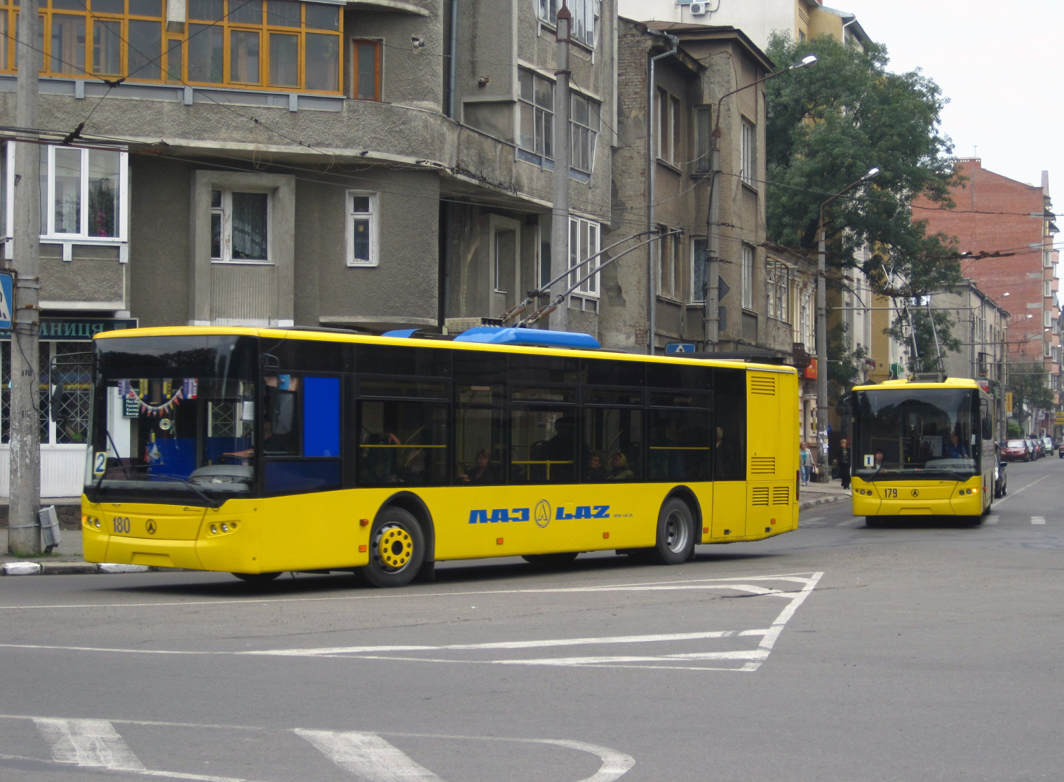 Нові тролейбуси в Івано-Франківську.